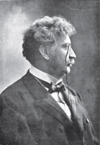 Antonín Pikhart (1861 - 1909), Český překladatel .